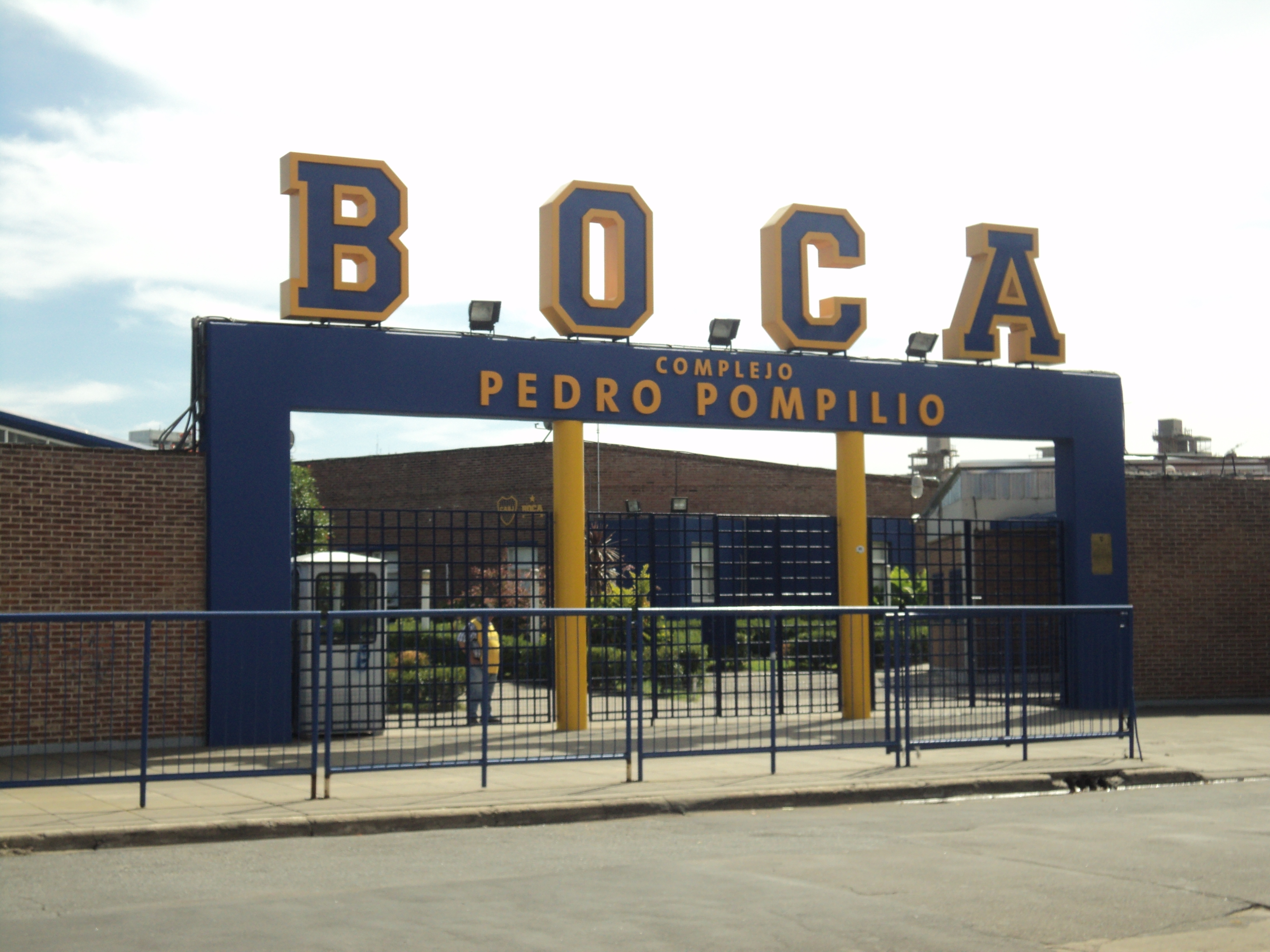 El complejo Pedro Pompilio donde entrena Boca.